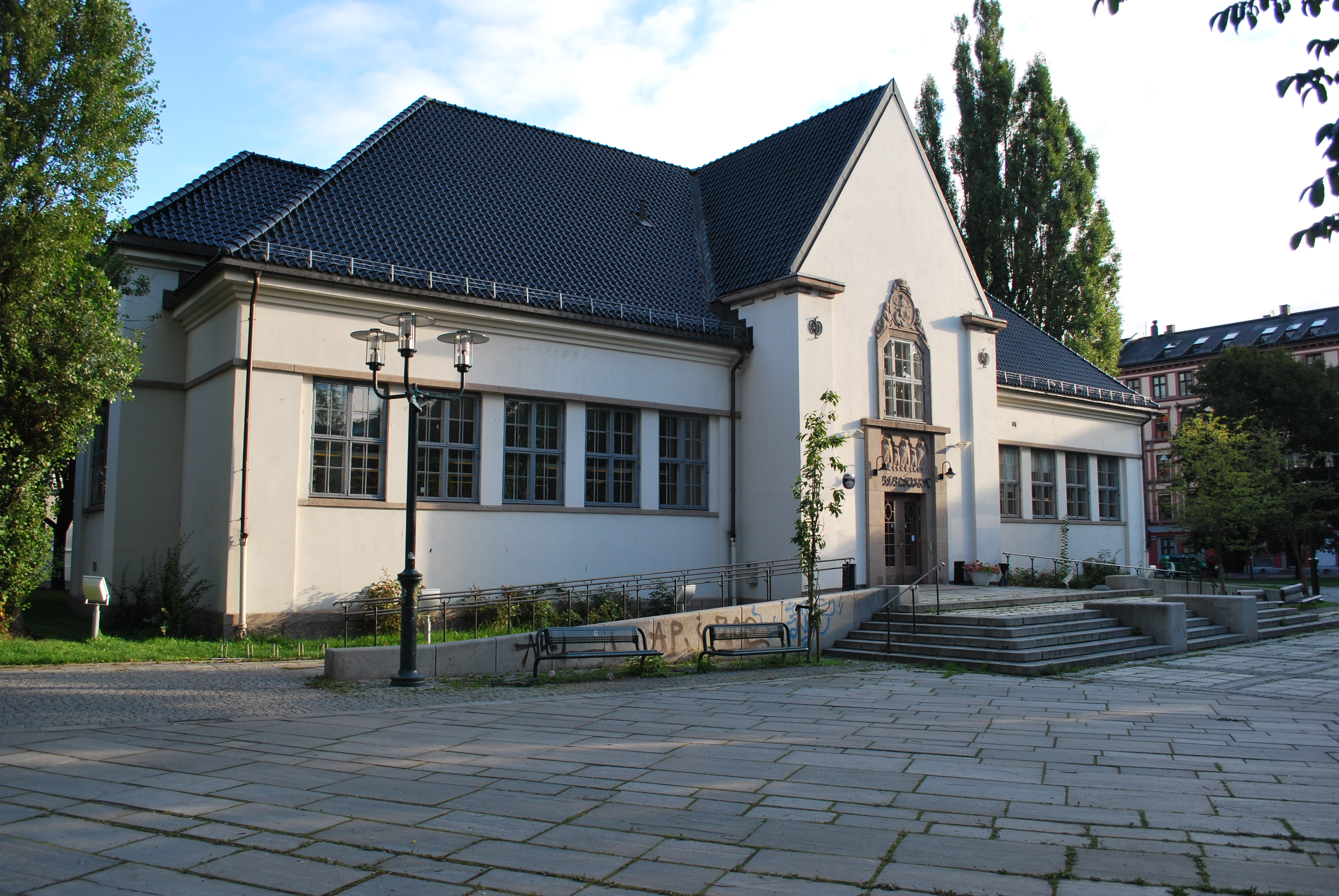 Deichmanske bibliotek på Schous plass